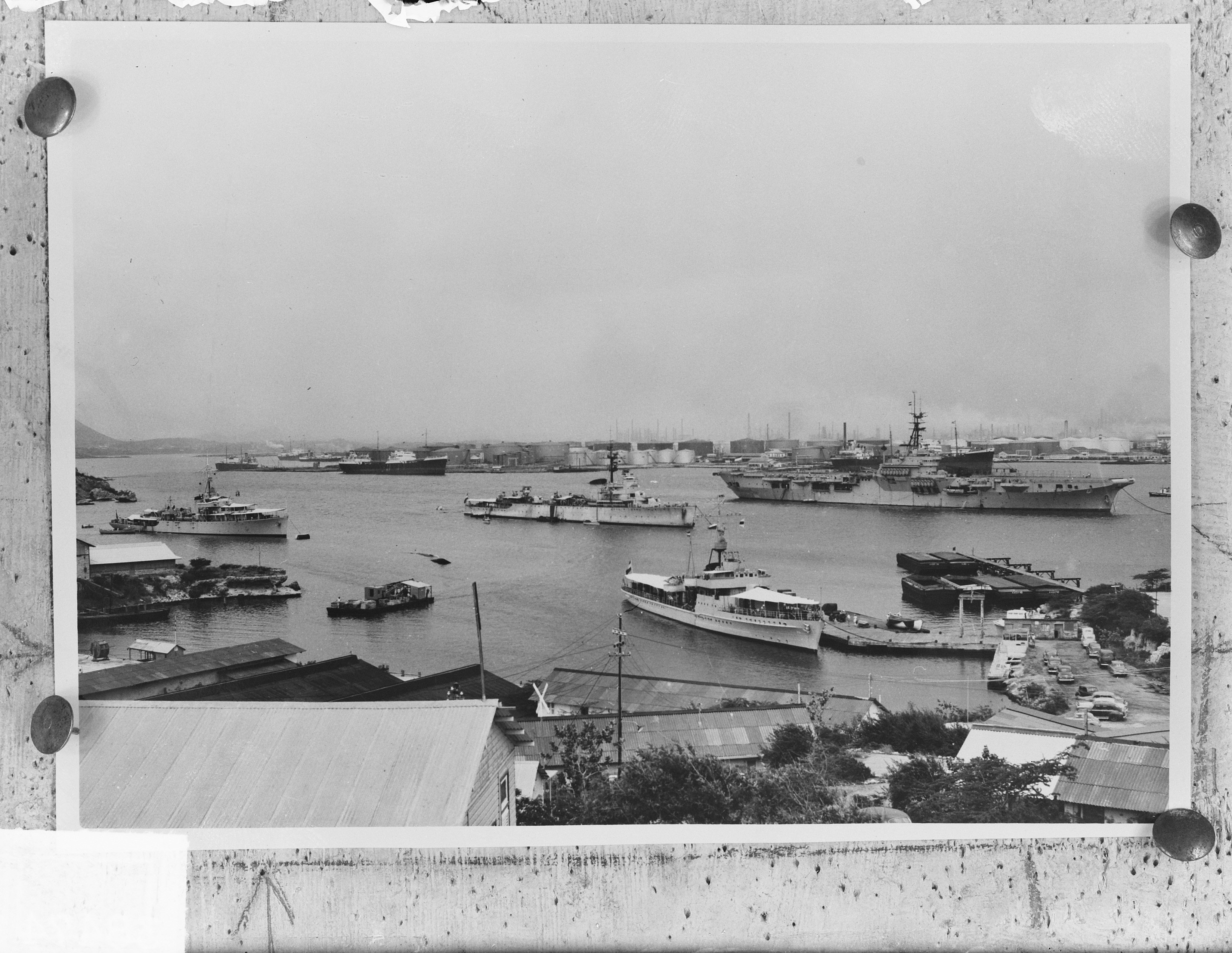 Collectie / Archief : Fotocollectie Anefo Reportage / Serie : [ onbekend ] Beschrijving : Karel Doorman + smaldeel Stoma Baai Curacao Datum : 1 maart 1950 Locatie : Curacao Fotograaf : Foto Fischer Auteursrechthebbende : Nationaal Archief Materiaalsoort : Glasnegatief Nummer archiefinventaris : bekijk toegang 2.24.01.09 Bestanddeelnummer : 903-8474 Reacties Geplaatst door CaspaR op 10 juli 2014 - 16:14. Het Schottegat, de haven van Willemstad. Foto genomen vanaf Marinebasis Parera met op de achtergrond de opslagtanks en schoorstenen van de Shell raffinaderij.